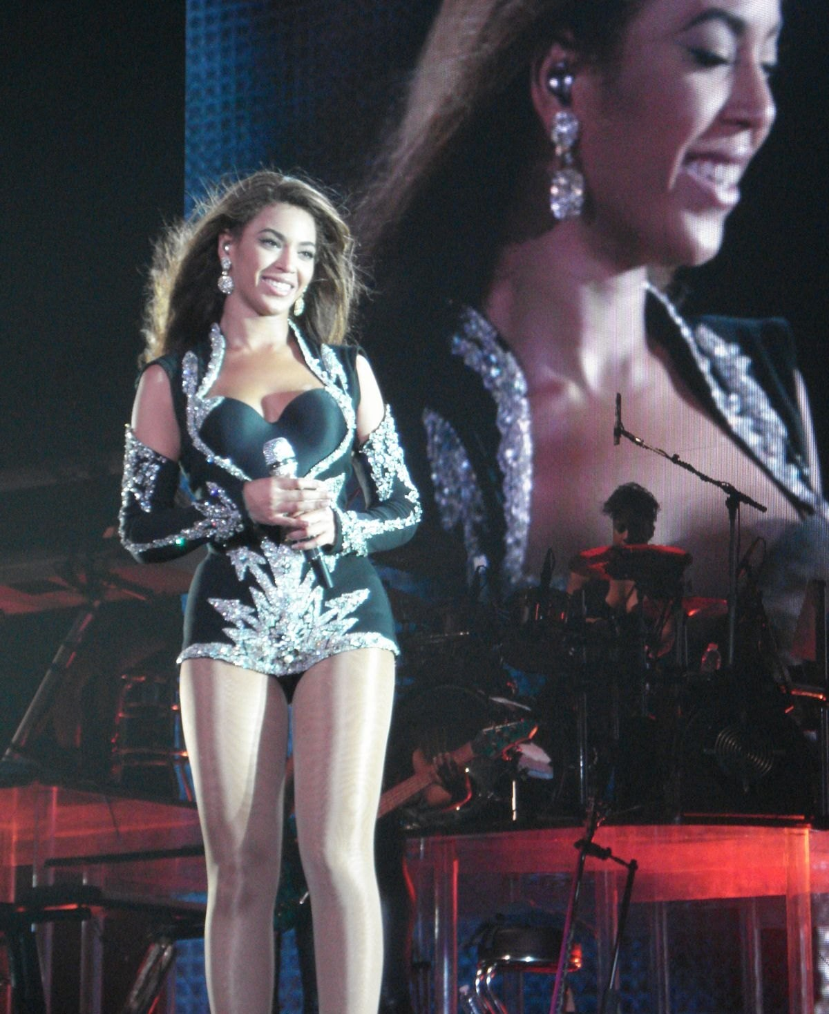 Beyonce durante el I am... Tour en Antwerp Bélgica